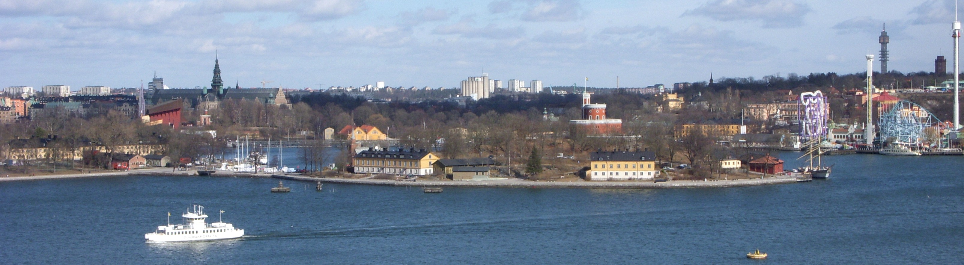 Kastellholmen panorama från Mosebacke